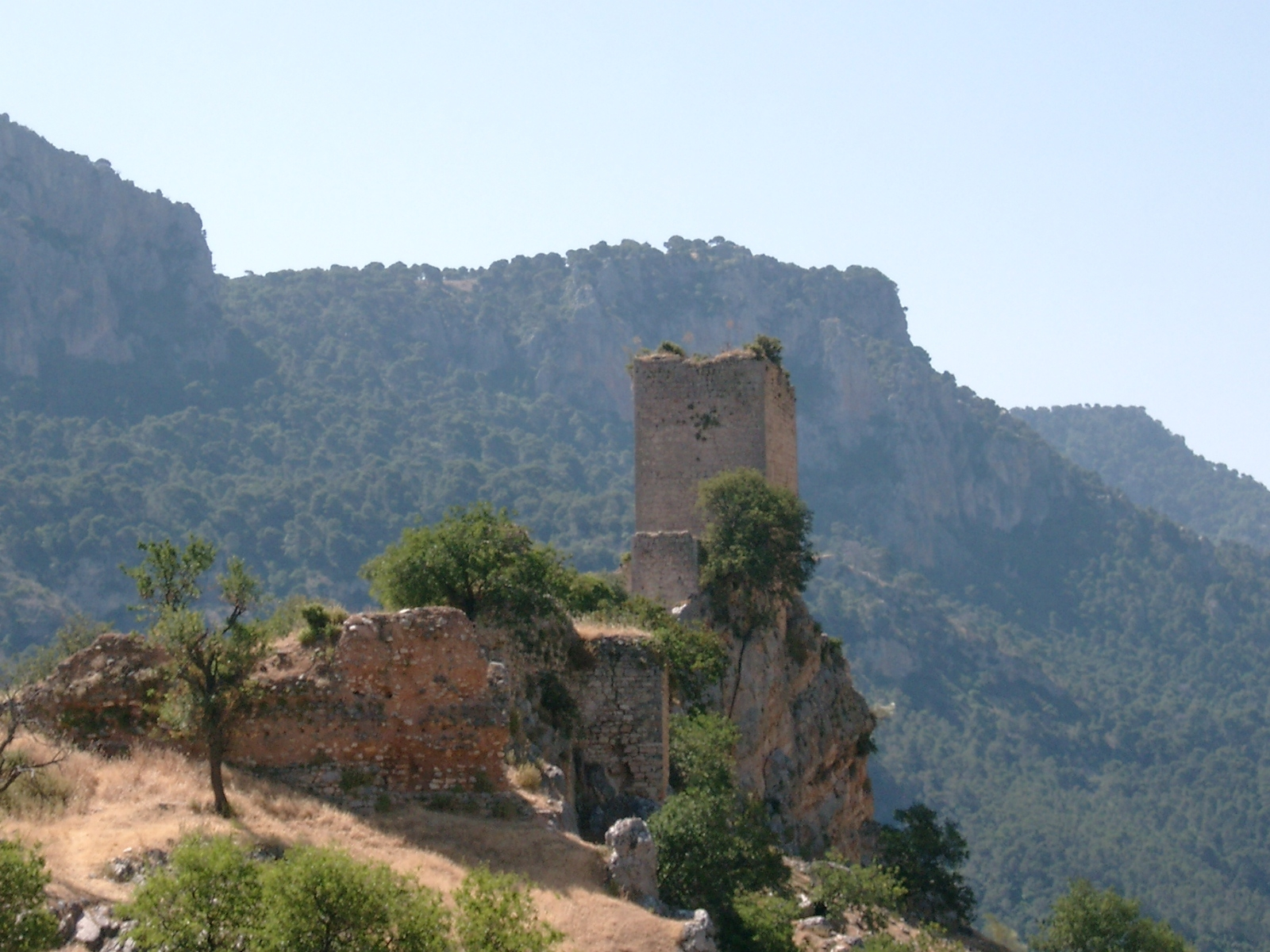 Fotografía del castillo medieval de Otíñar (Jaén).